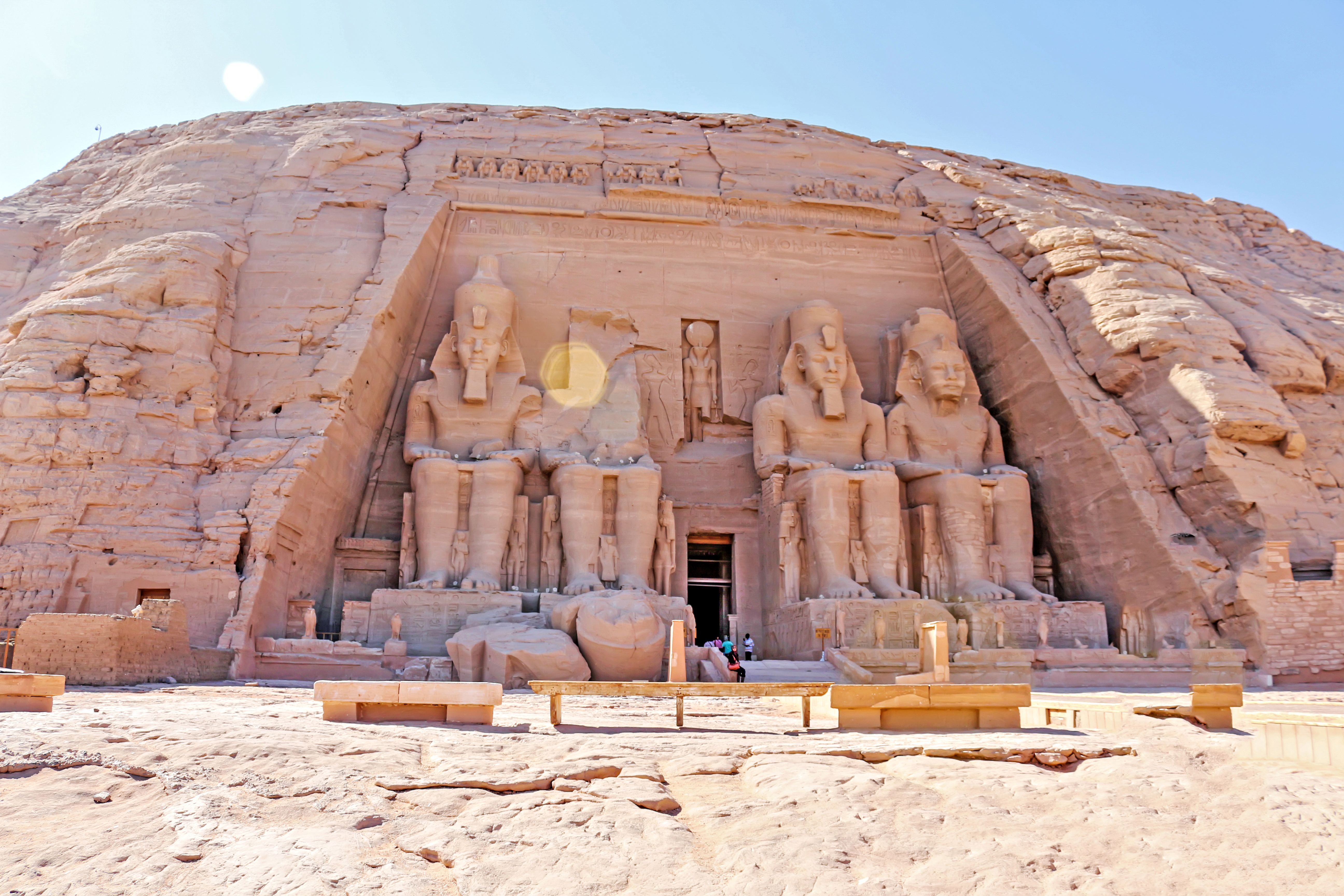 Chrám Abú Simbel, Egypt